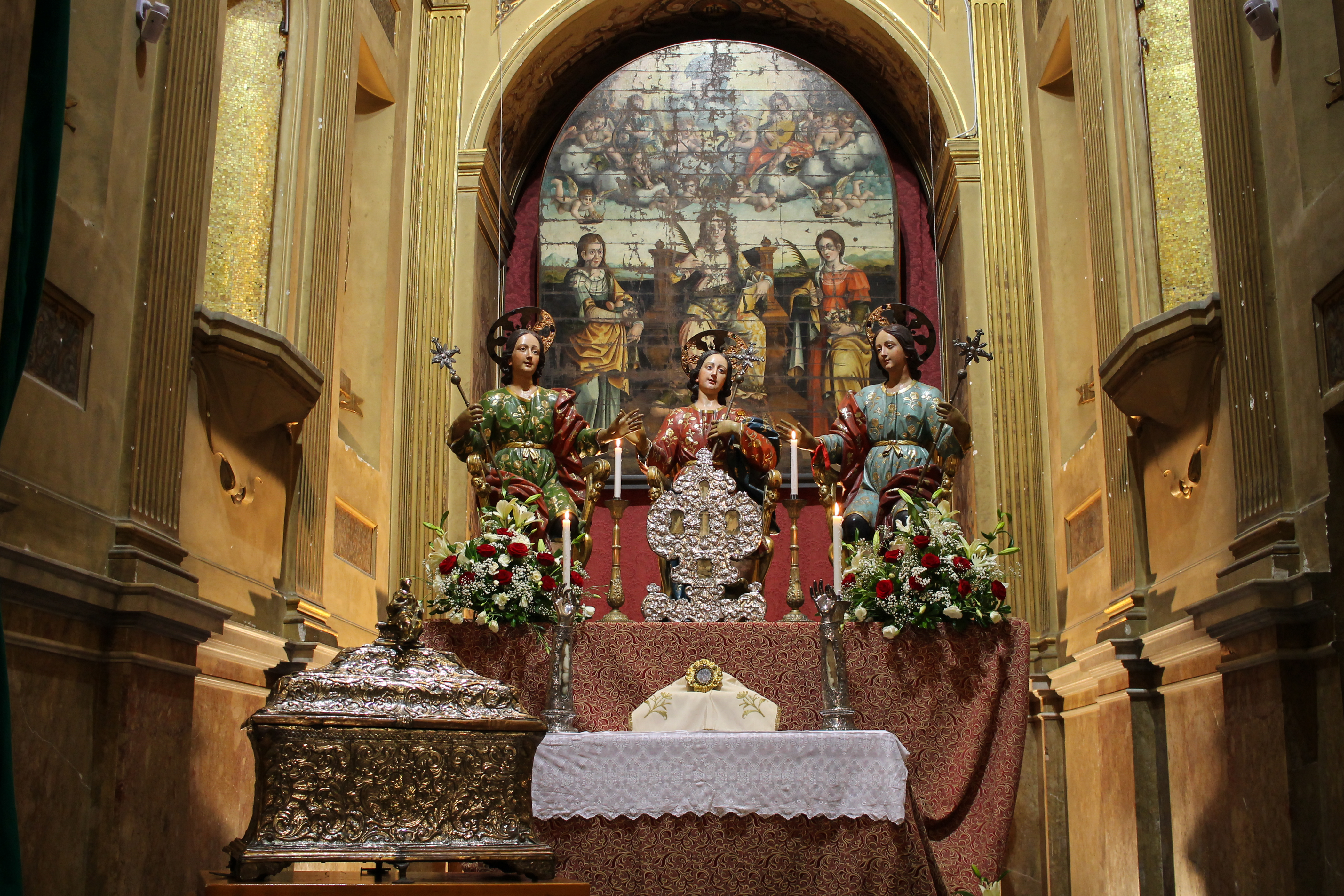 Ex cattedrale dedicata a Santa maria La Cava e i fratelli Alfio, Filadelfo e Cirino, patroni e protettori della città di Lentini. La chiesa ha origine nel periodo paleocristiano, come testimonia la presenza al suo interno, nella navata destra, un complesso di tre arcosoli, scavati nella roccia, luogo di sepoltura dei 3 fratelli. L'attuale chiesa venne costruita dopo il terremoto del 1693 ed ultimata nel 1750. La facciata è di stile tardo barocco, finemente decorata, mentre al suo interno e ricca di decorazioni in stucco, affreschi, tele del XVII-XVIII secolo e molti altri reperti ed opere.